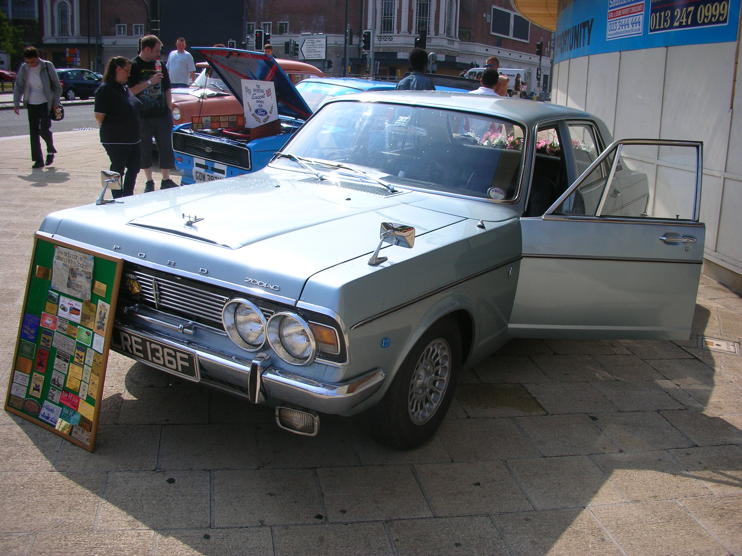 1967 Ford Zodiac MK4